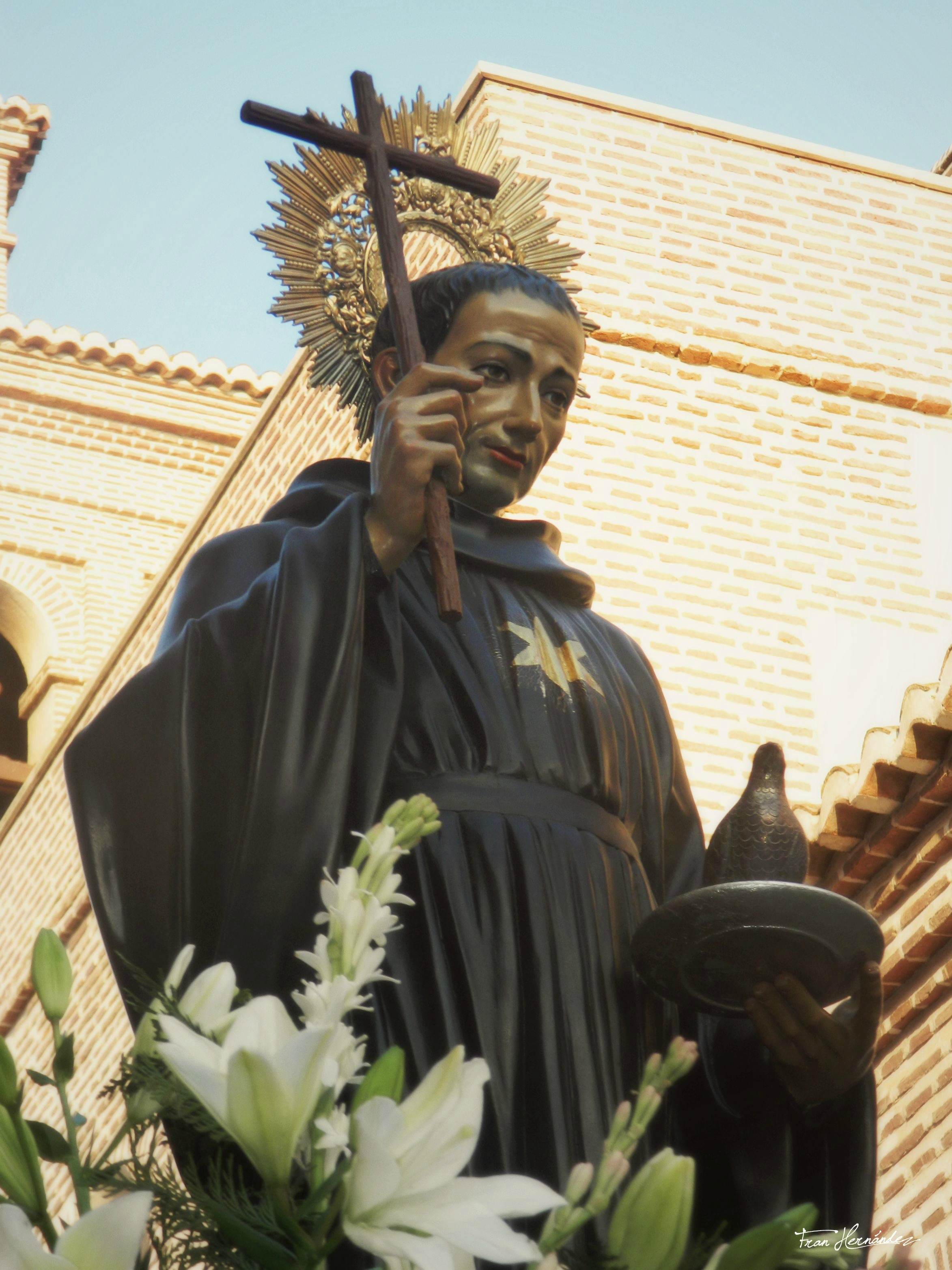 Imagen de San Nicolás de Tolentino, Patrón de la Ciudad de Adra (Almería)